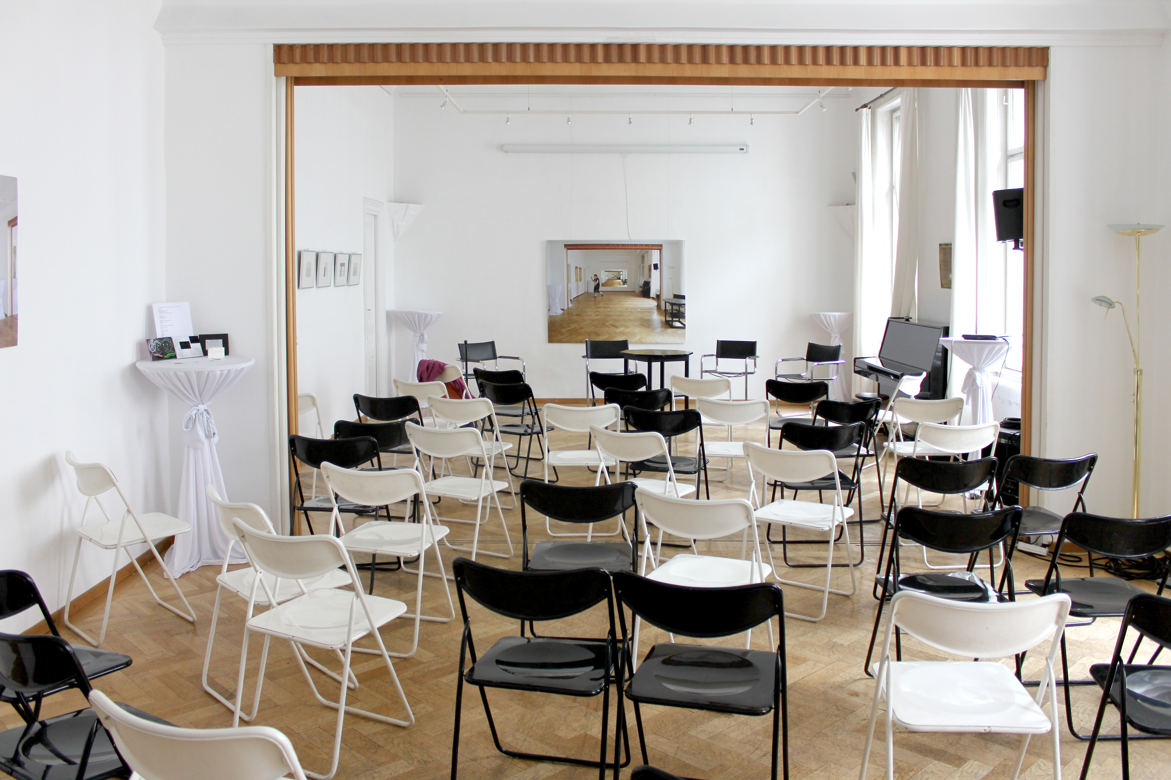 Ausstellung von Eva Mohringer-Milowiz im Club Alpha in Wien 01, Stubenbastei 12/14, Foto von Anton-kurt, überarbeitet von Eva Mohringer-Milowiz, Fotografstandpunkt Raum rechts, Fotorichtung in den Raum links, mittig an der Wand im Raum links der Digitaldruck 150 x 120 cm . Der Hauptraum Galerieraum Mehrzweckraum vom Club Alpha mit Bestuhlung gilt für eine Veranstaltung.